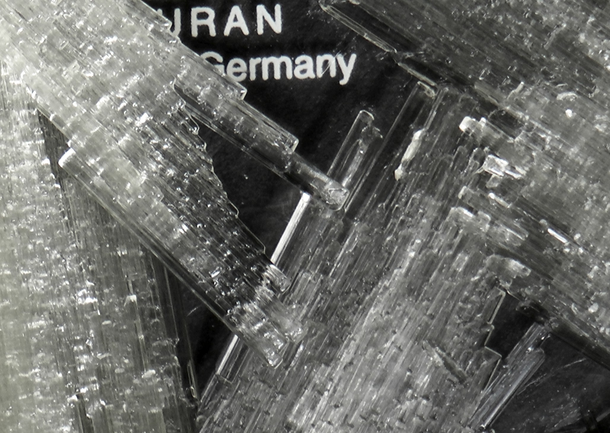 Nadelförmiges, grobkristallines Kaliumnitrat